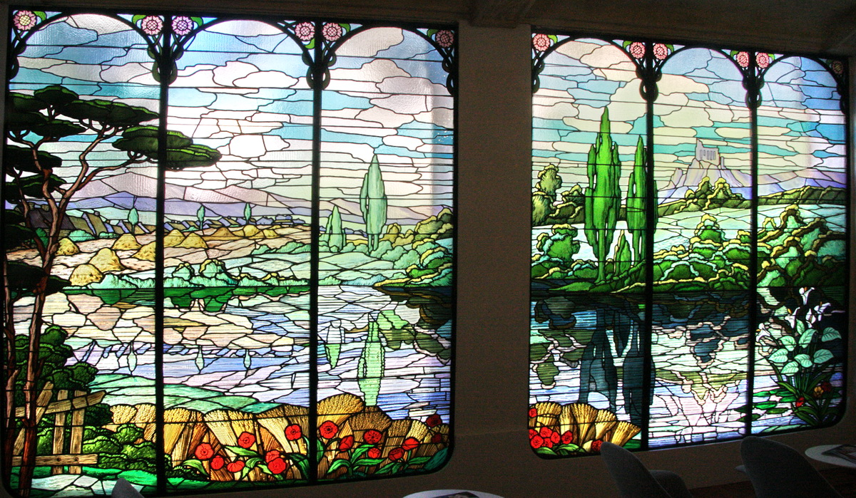 Vitrall modernista d'Antoni Rigalt ubicat a la casa Garriga Nogués, carrer Diputació 250 (Barcelona, Catalunya)